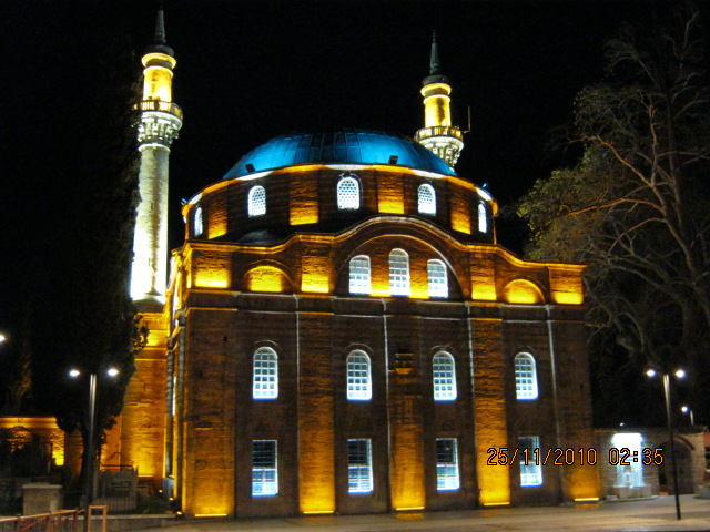 emirsultan camii bursa